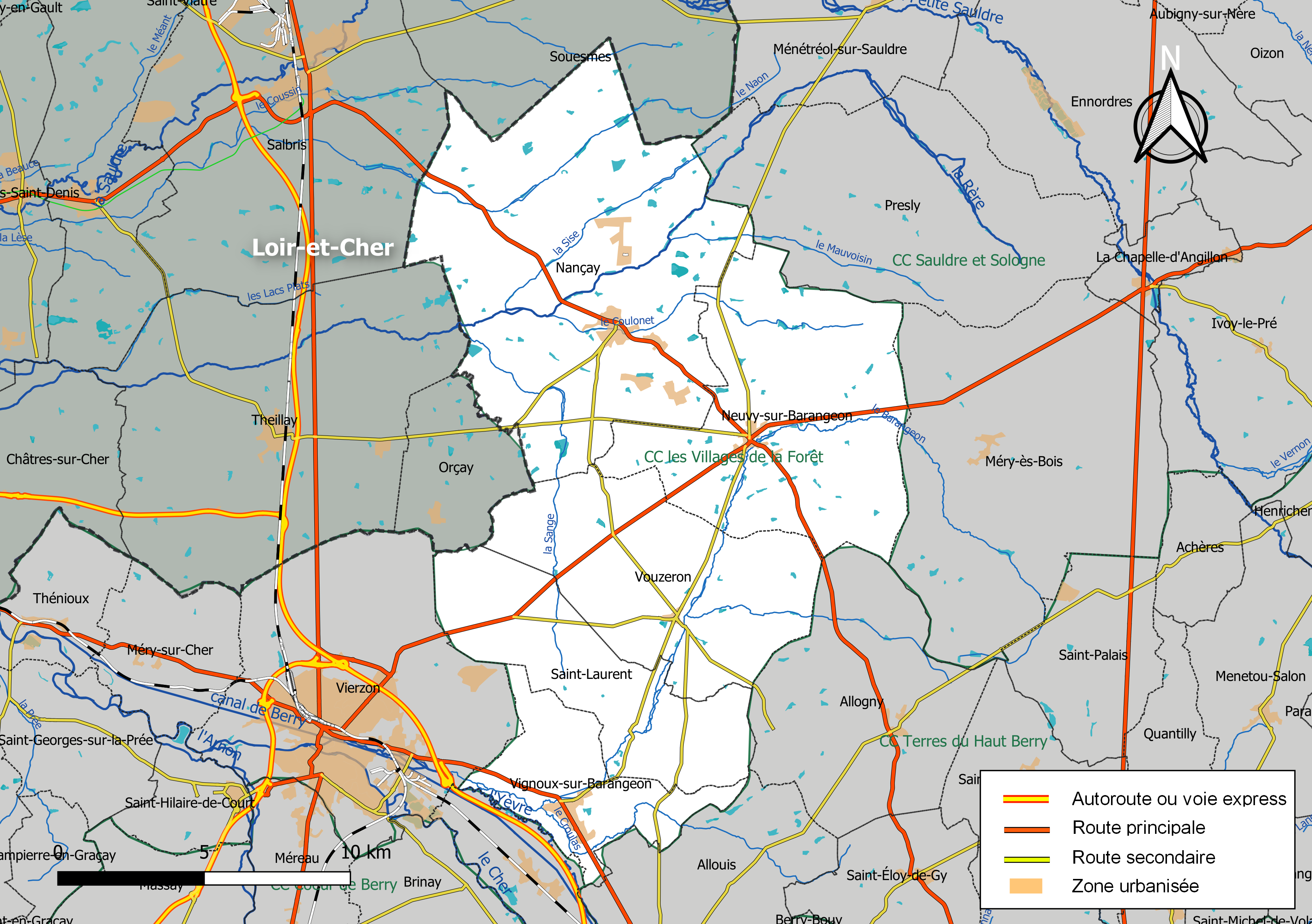 Carte géographique de la communauté de communes les Villages de la Forêt, département du Cher, France. Composition au 1er janvier 2019.